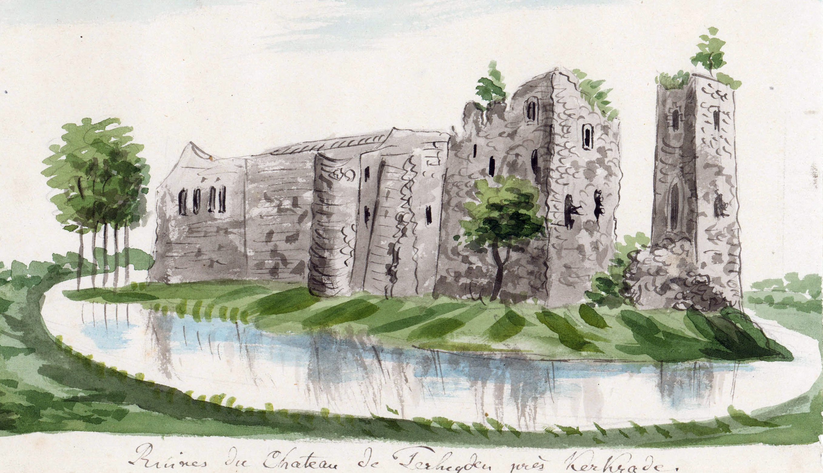 Ingekleurde tekening van Philippe van Gulpen van de ruïne van Haus Heyden in Horbach nabij Aken/Kerkrade. Bijschrift: Ruines du Château de Terheyden près Kerkade. Collectie Van der Noordaa in het RHCL, Maastricht, CVDN 316.